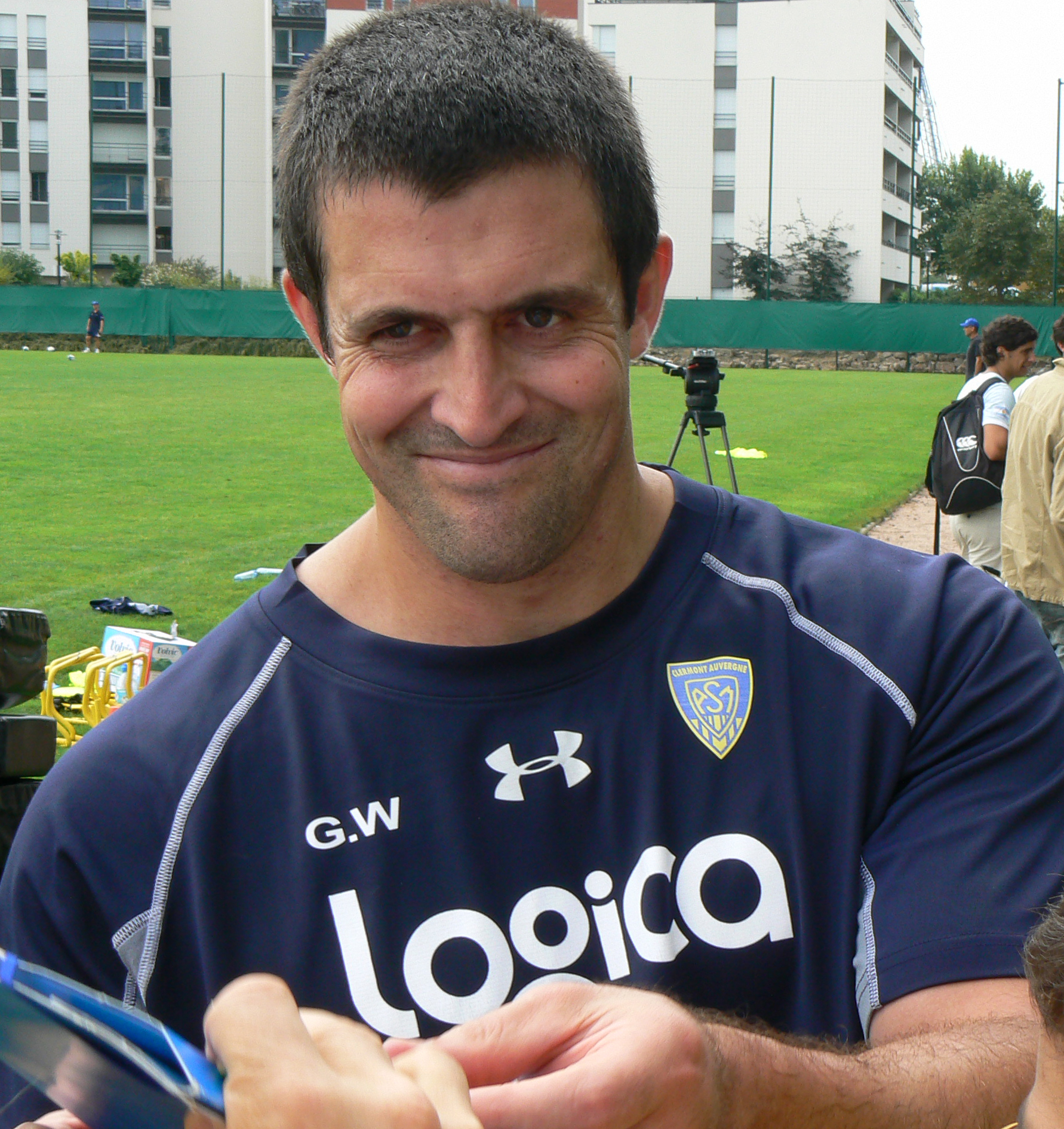 Le rugbyman samoan Gavin Williams lors d'un entrainement avec l'ASM Clermont Auvergne.